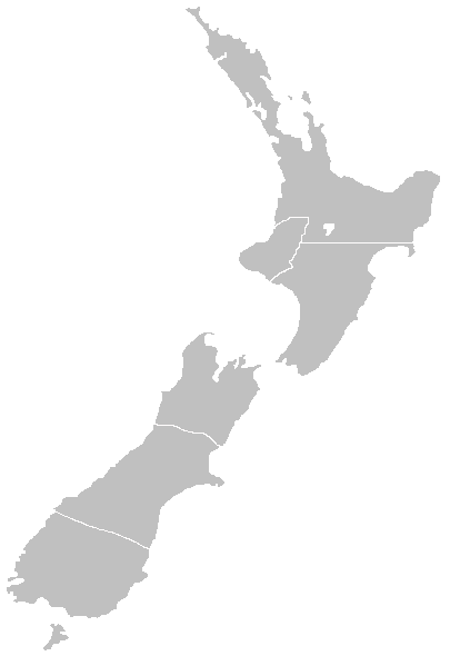 Original 1852 provinces